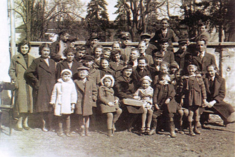 Српски (ћирилица): Чланови Руске колоније у Бањалуци 1940.